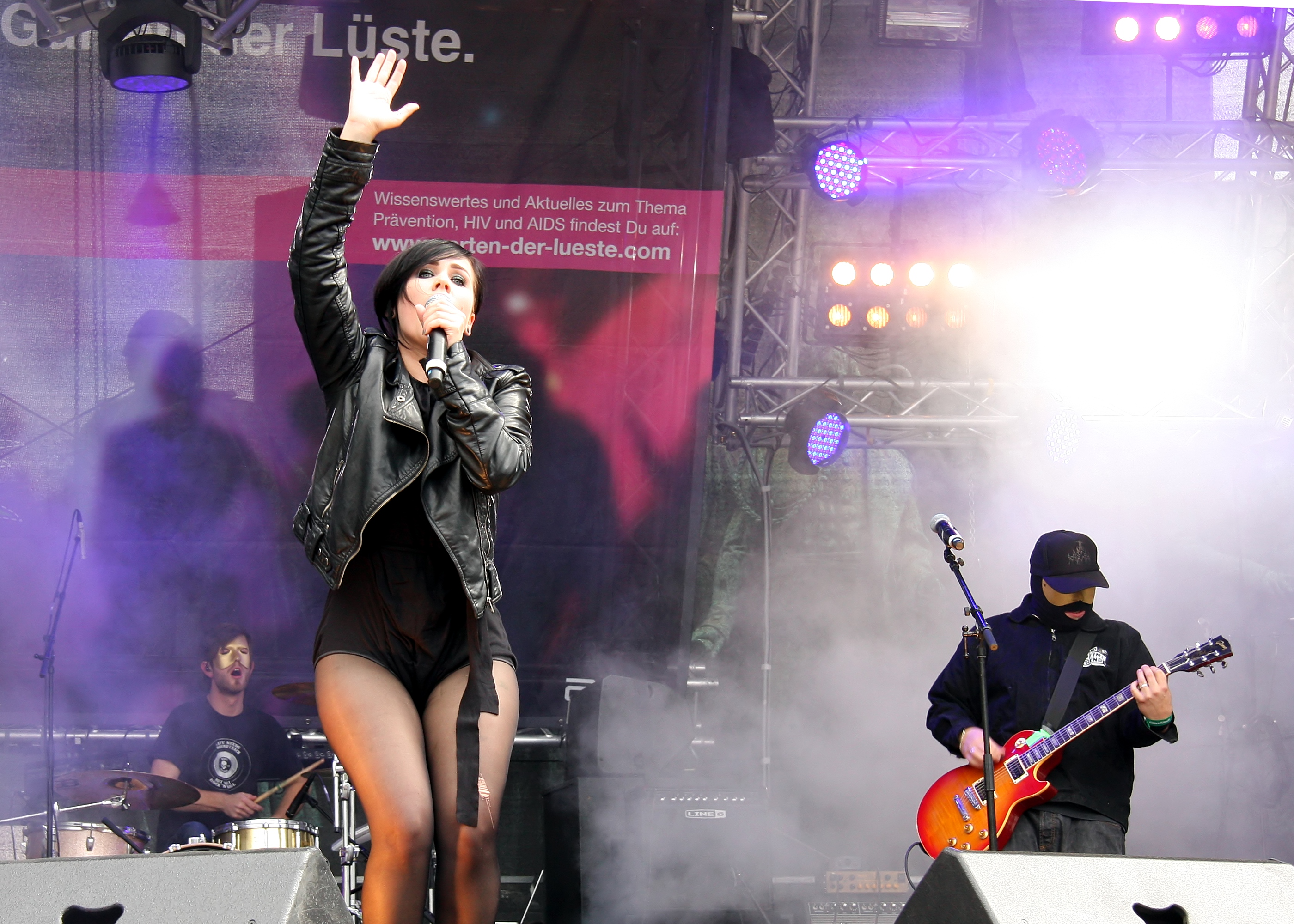 Electro-Pop-Punk-Band "Deine Jugend" aus Mannheim. Bühnenprogramm zum CSD-Straßenfest/ColognePride 2011. Hauptbühne auf dem Heumarkt, Köln.